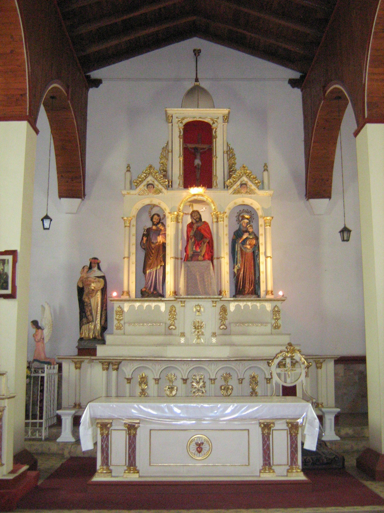 Capilla del Señor de la Humildad, municipio de Santa Rosa de Osos, Antioquia, Colombia.